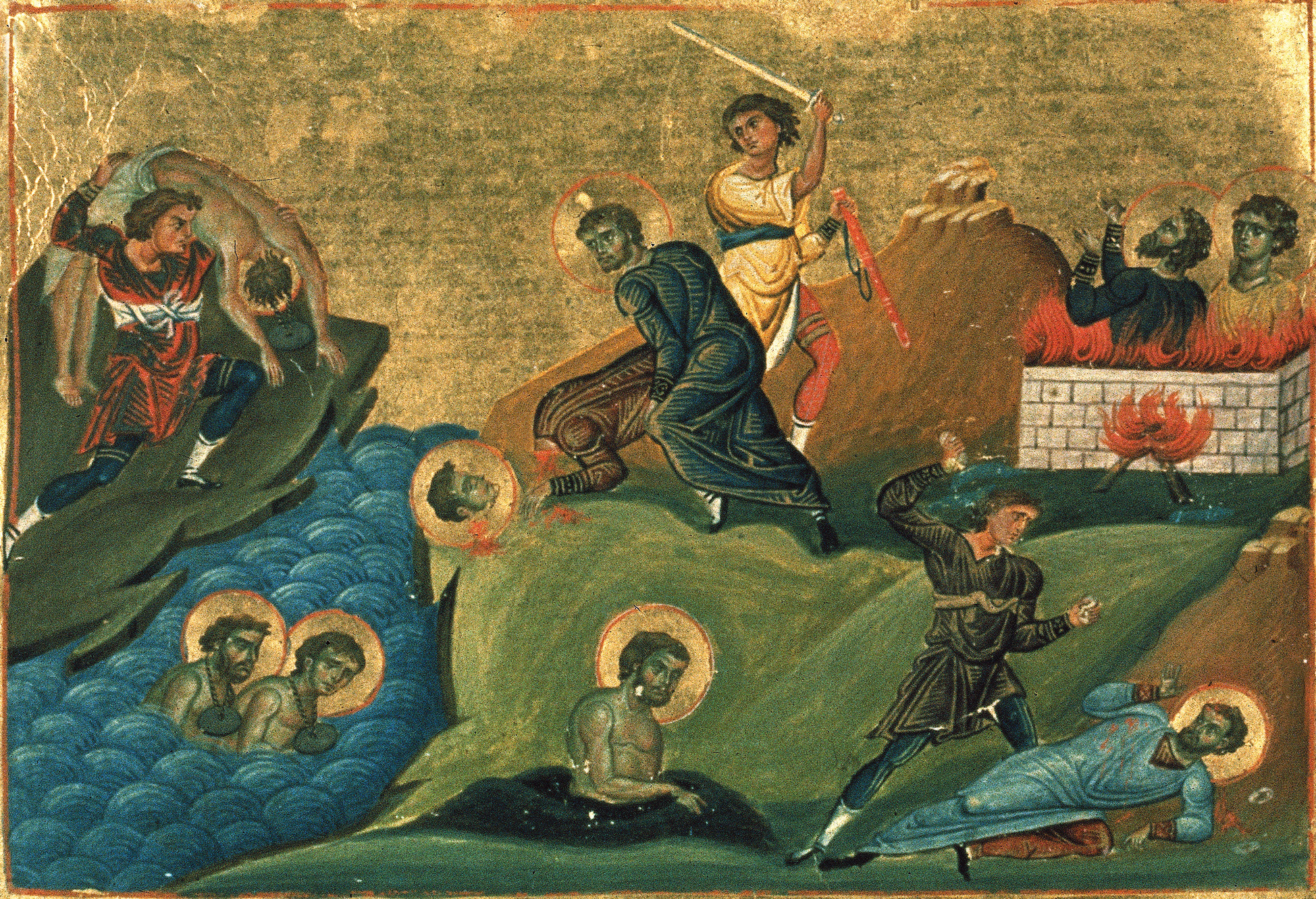 Hieromartyr Anthimus, Bishop of Nicomedia, and those with him: Martyrs Theophilus the Deacon, Dorotheus, Mardonius, Migdonius, Peter, Indes, Gorgonius, Zeno, Virgin Domna, and Euthymius Мученики Никомидийские Константинополь. 985 г. Миниатюра Минология Василия II. Ватиканская библиотека. Рим.